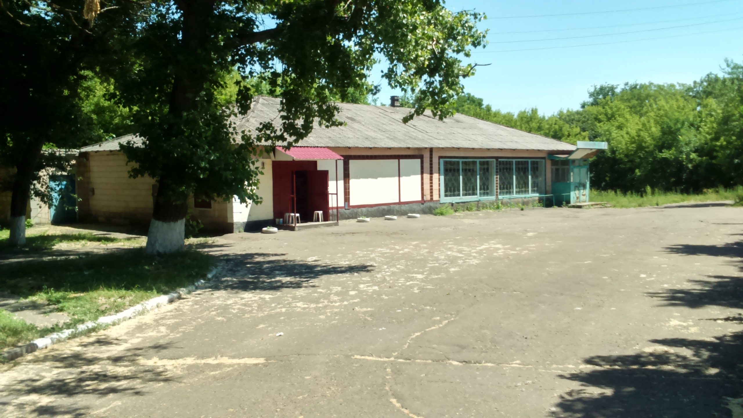 Ві́рівка — село в Україні, Добропільському районі Донецької області.